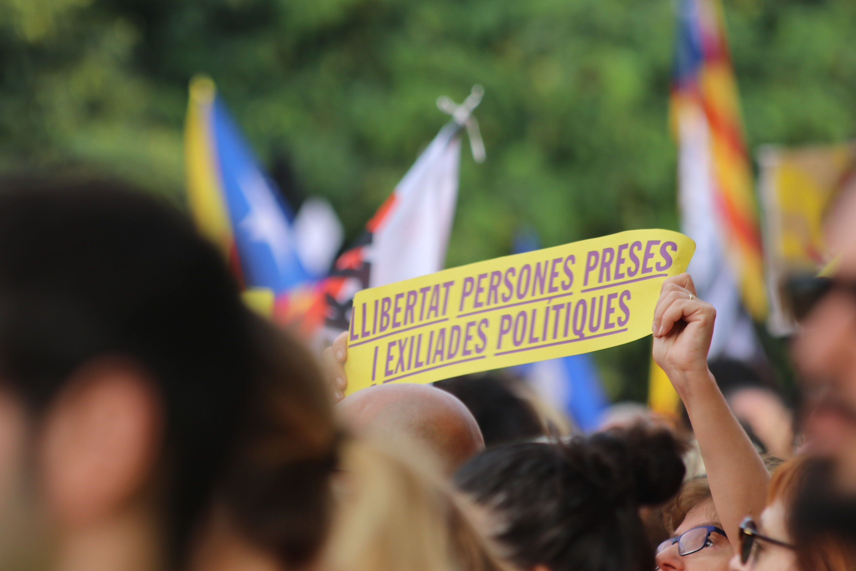 Manifestació de l'11 de setembre de 2018 a l'Avinguda Diagonal de Barcelona.